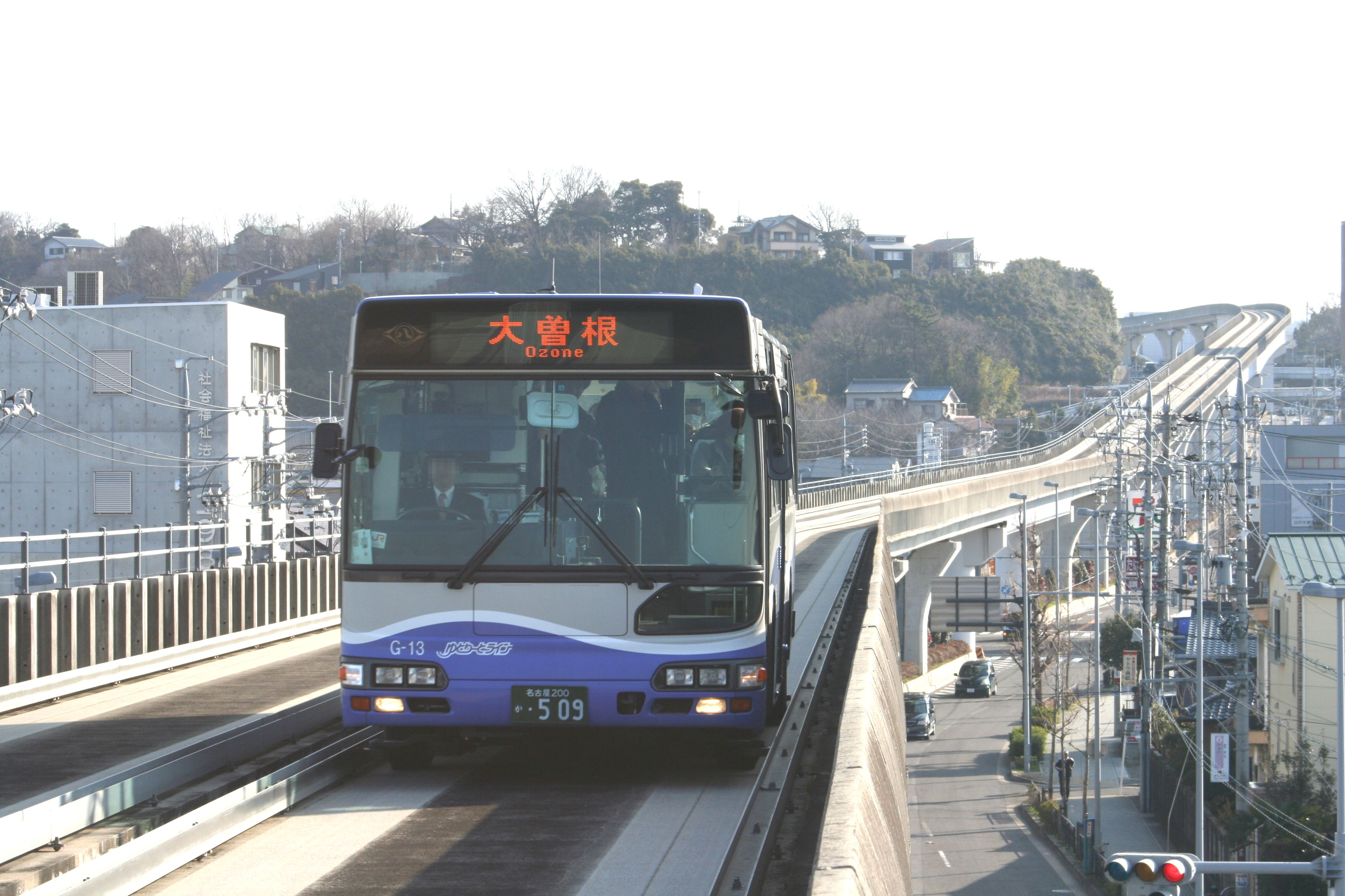 名古屋ガイドウェイバス/ゆとりーとライン